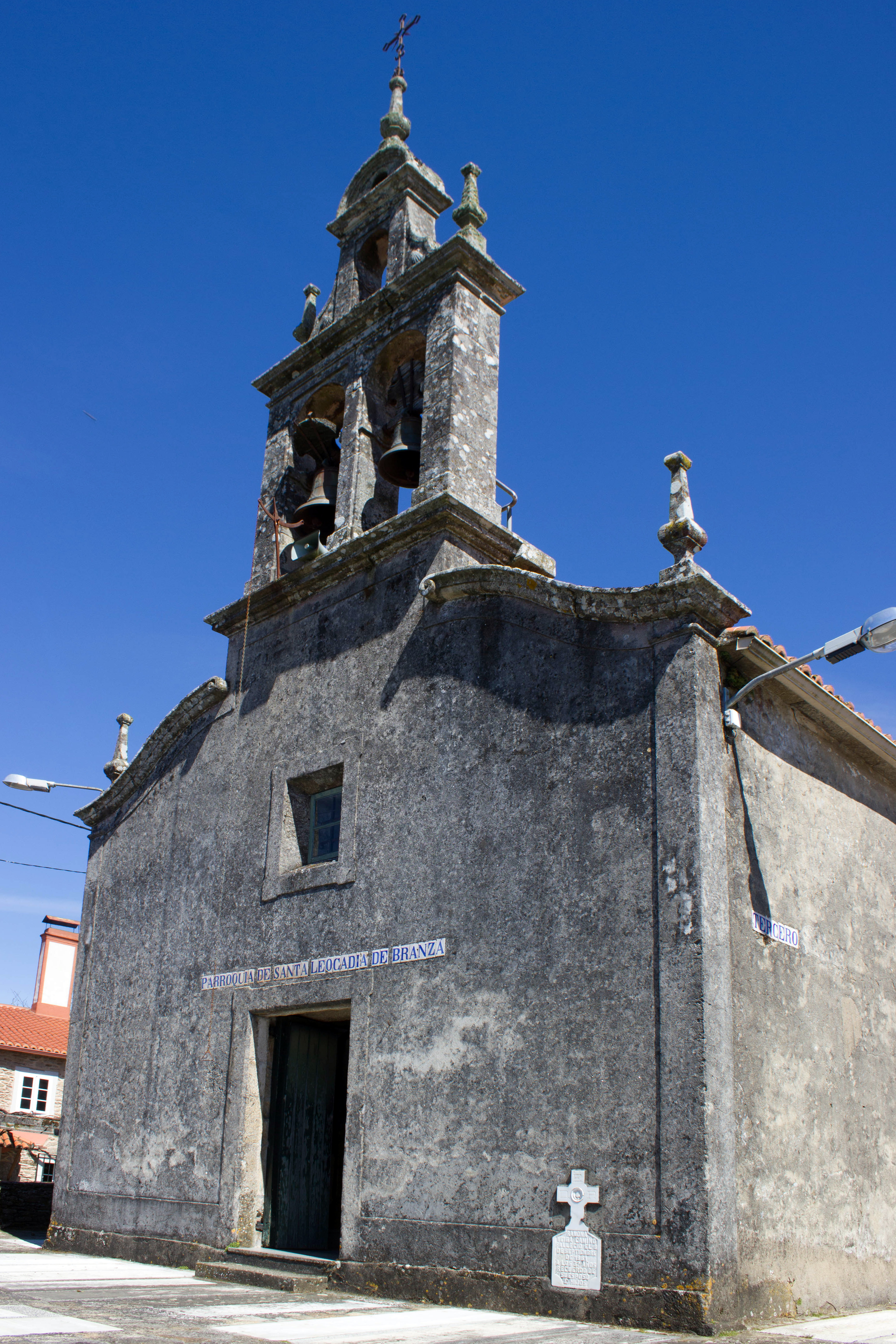 Igrexa de Santa Locaia de Branzá, no concello de Arzúa.